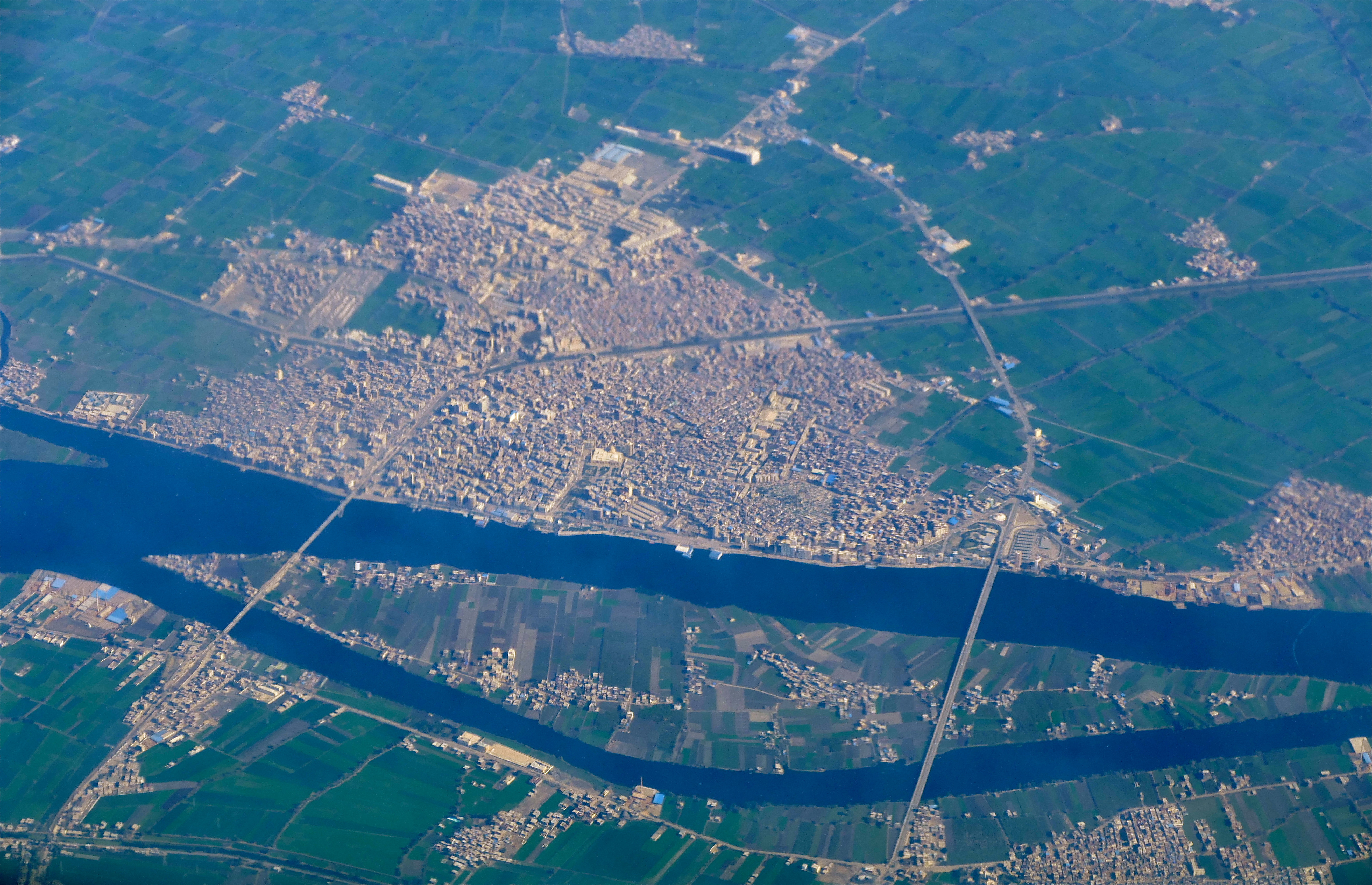 Nile Delta, EGYPT